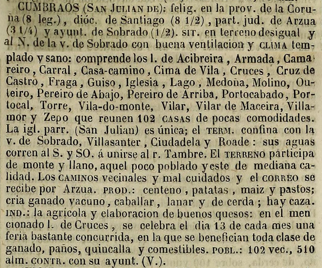 Cumbraos no Diccionario geográfico-estadístico-histórico de España y sus posesiones de Ultramar.